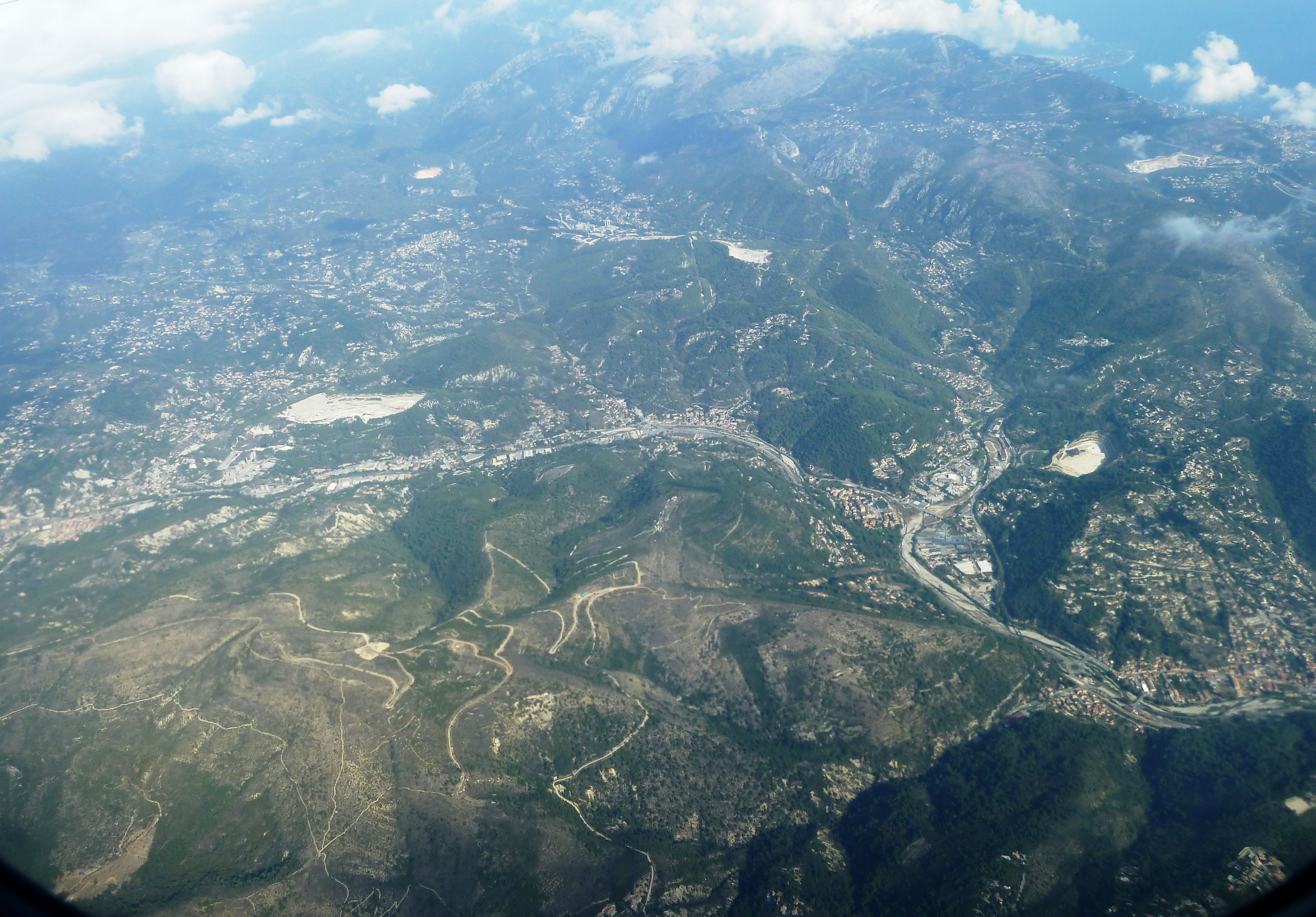 vallée du paillon et paillon de contes